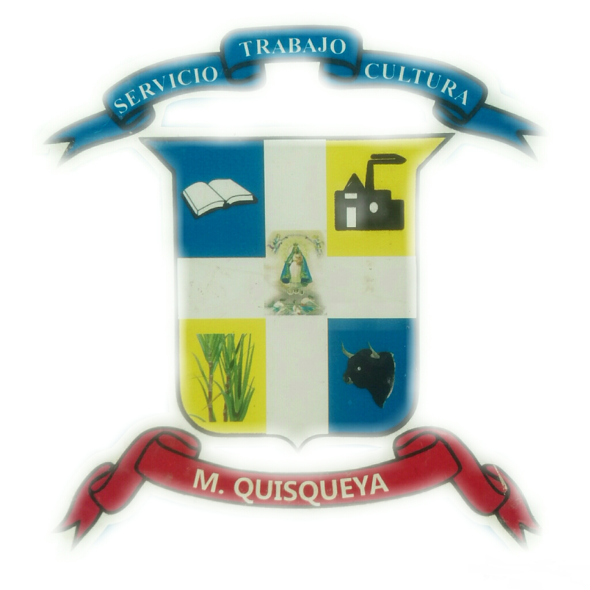 Escudo Municipio Quisqueya